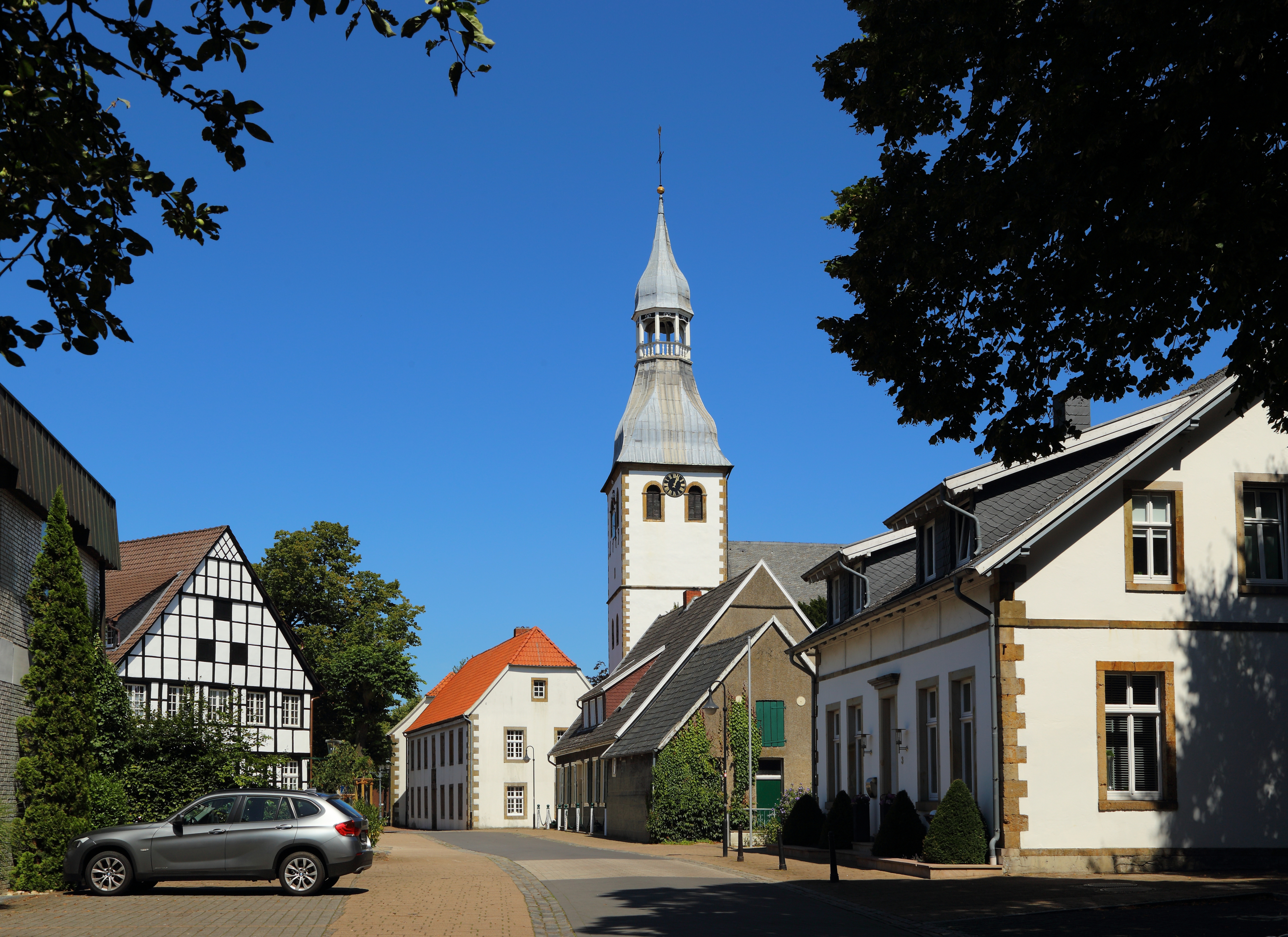 Brenninkmeyer Street (Brenninkmeyerstraße) in Hopsten, Kreis Steinfurt, North Rhine-Westphalia, Germany. In the background one can see the tower of the Roman Catholic St George Parish Church.